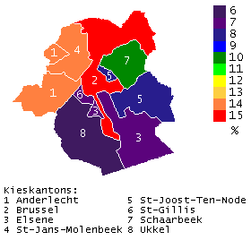 Indicatie van het percentage Nederlandstaligen in het Brussels Hoofdstedelijk Gewest op basis van de verkiezingsuitslag van de regionale verkiezingen van 7 juni 2009. Op de kaart wordt het aantal stemmen op Nederlandstalige partijen weergeven als percentage van het totaal aantal geldige stemmen op basis van de officiële verkiezingsuitslag per kieskanton. De in de percentages opgenomen Nederlandstalige partijen zijn sp.a, SLP, N-VA, GROEN!, VLAAMS BELANG, CD&V, Open VLD, Lijst Dedecker, PVDA+, PRO BRUXSEL (Nederlandstalige lijst), B.U.B. (BELG.UNIE).